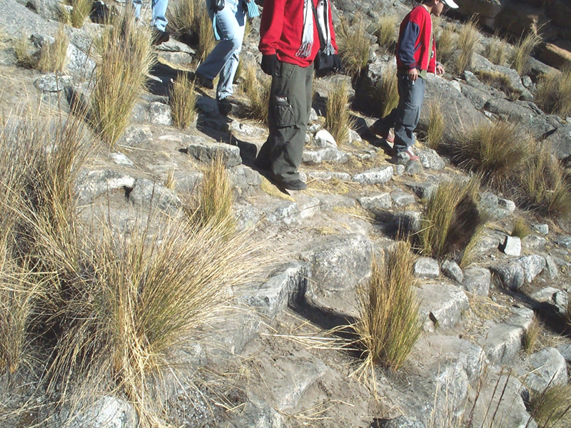 Escalerayoc - Tramo de camino Inca Jauja - Pachacamac